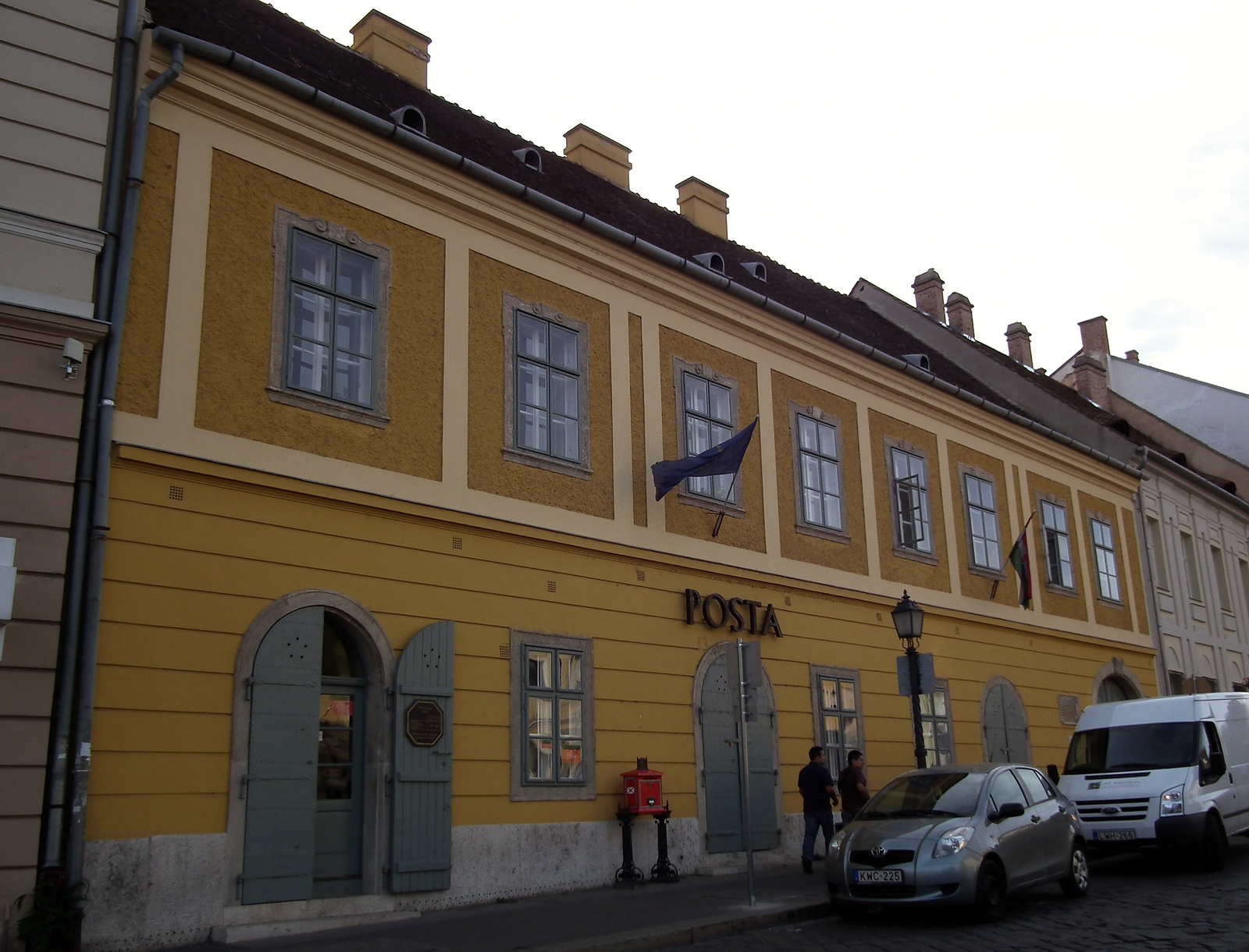 De la Motte-palota (Budapest 1, Dísz tér 15., Tóth Árpád sétány 3.) This is a photo of a monument in Hungary. Identifier: 85